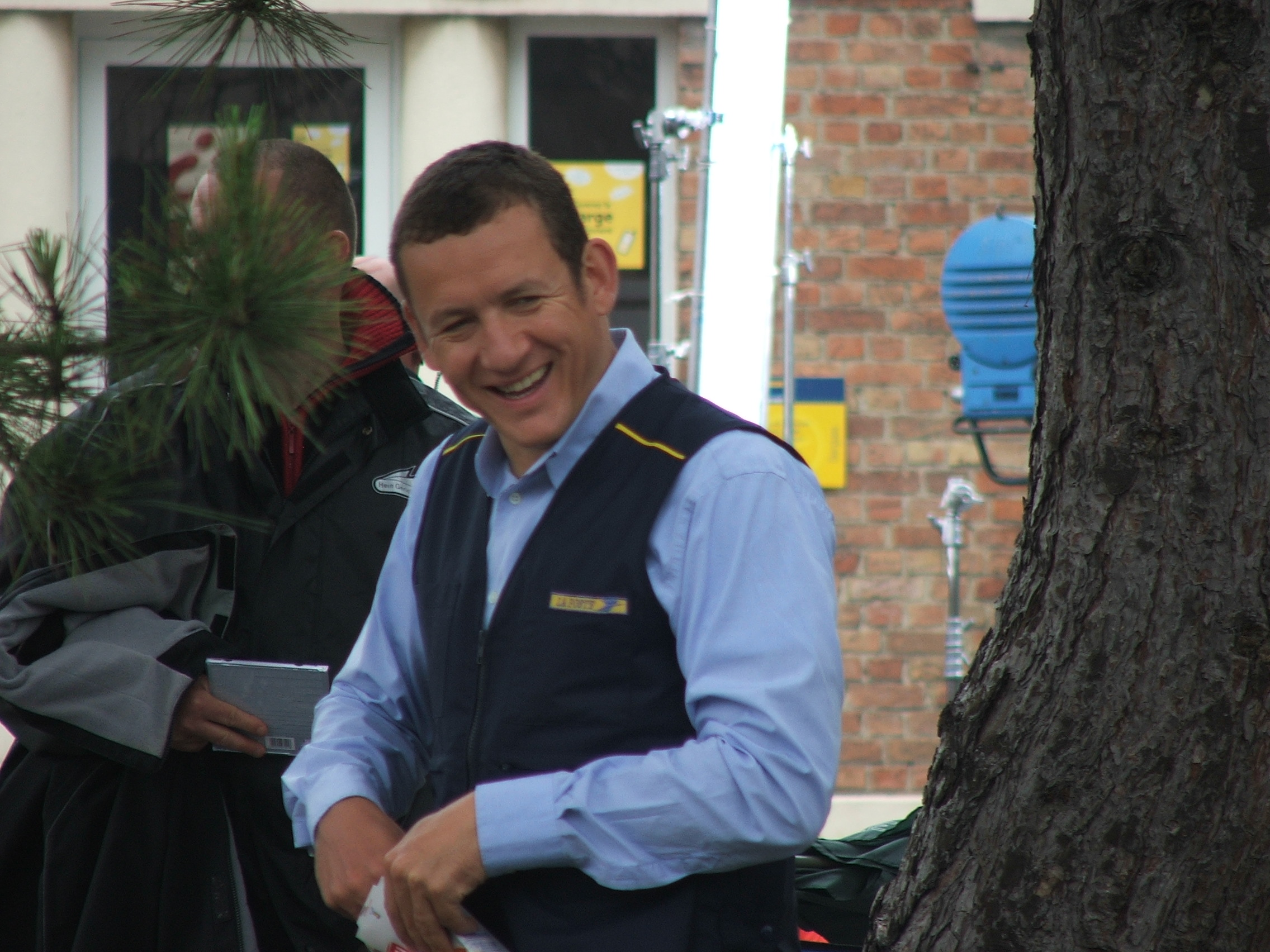 Photo de Dany Boon prise à Bergues lors du tournage du film Bienvenue chez les Ch'tis